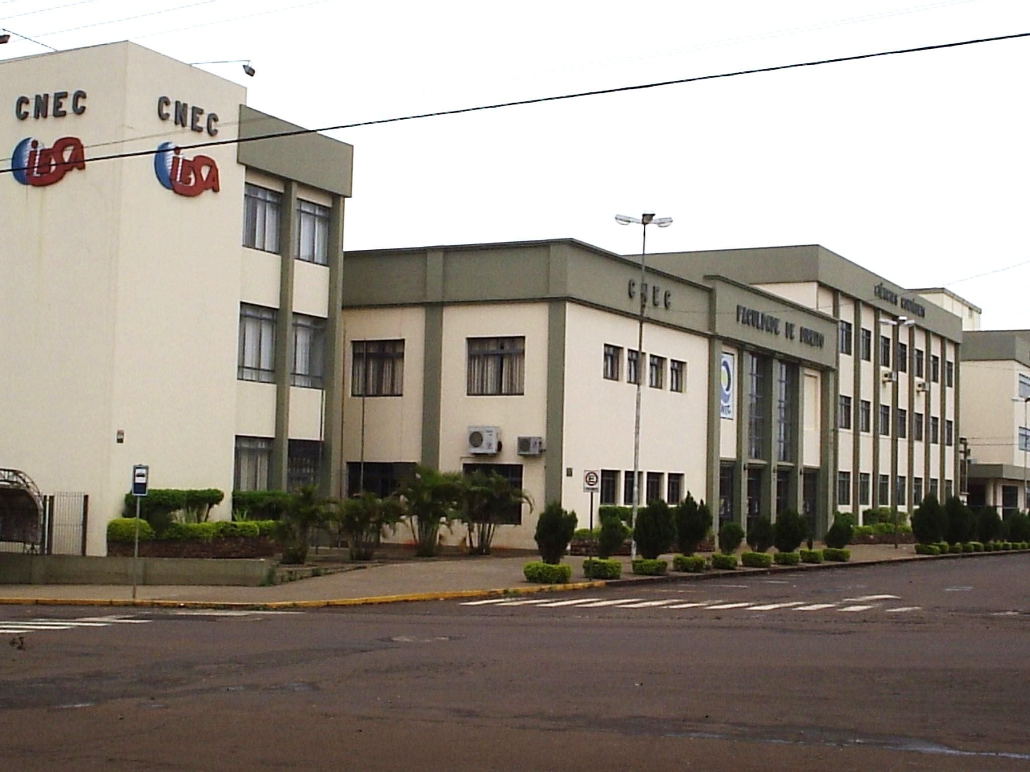 Instituto Cenecista de Ensino Superior de Santo Ângelo, Rio Grande do Sul.